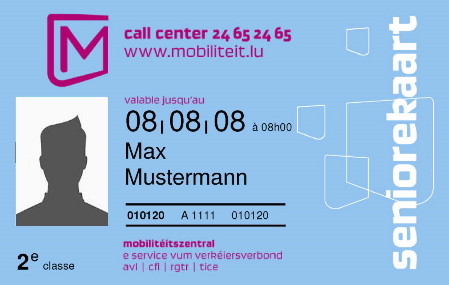 Abonnement annuel pour personnes âgées "Seniorekaart" (modèle 2008)